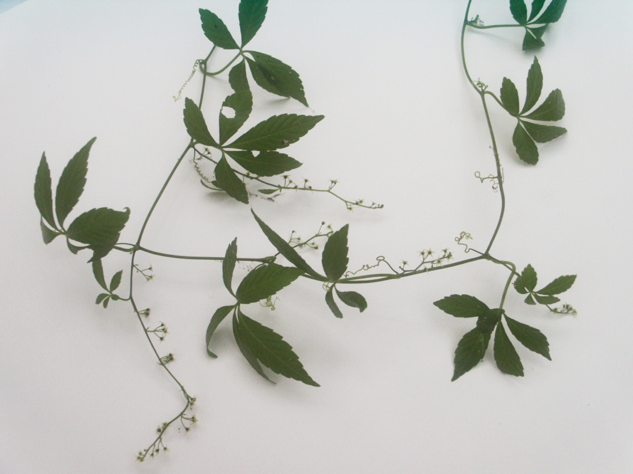 Jiaogulan - Gynostemma pentaphyllum details: flowers and leaves